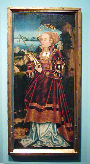 Leys Schütz, die Konkubine Kardinal Albrechts von Brandenburgals heilige Ursula, Zwei Altarflügel